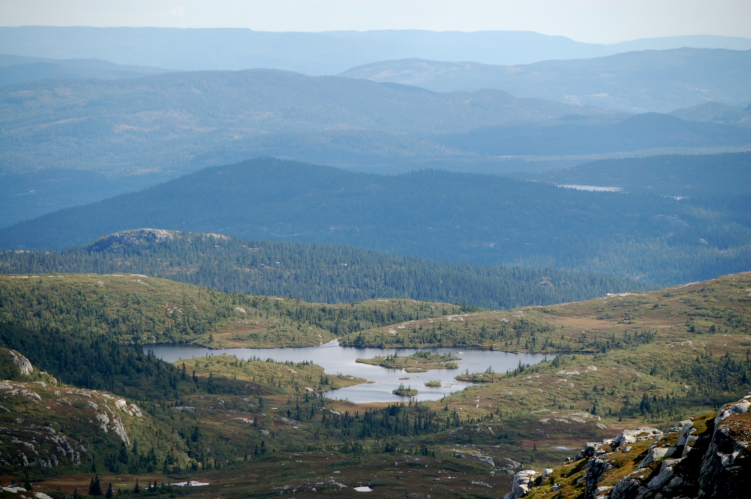 Kroktjønn (Kroktjern) i Rollag kommune Buskerud